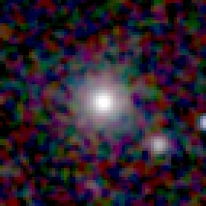 Galaxy NGC 28